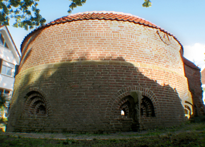 Außenansicht des Wiedenbrücker "Pulverturmes"